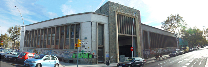 Antiga fàbrica Netol (1955-2007), obra de Santiago Balcells i Gorina. Actualment hi ha un edifici d'oficines (Interface) amb conservació de la façana original de Balcells